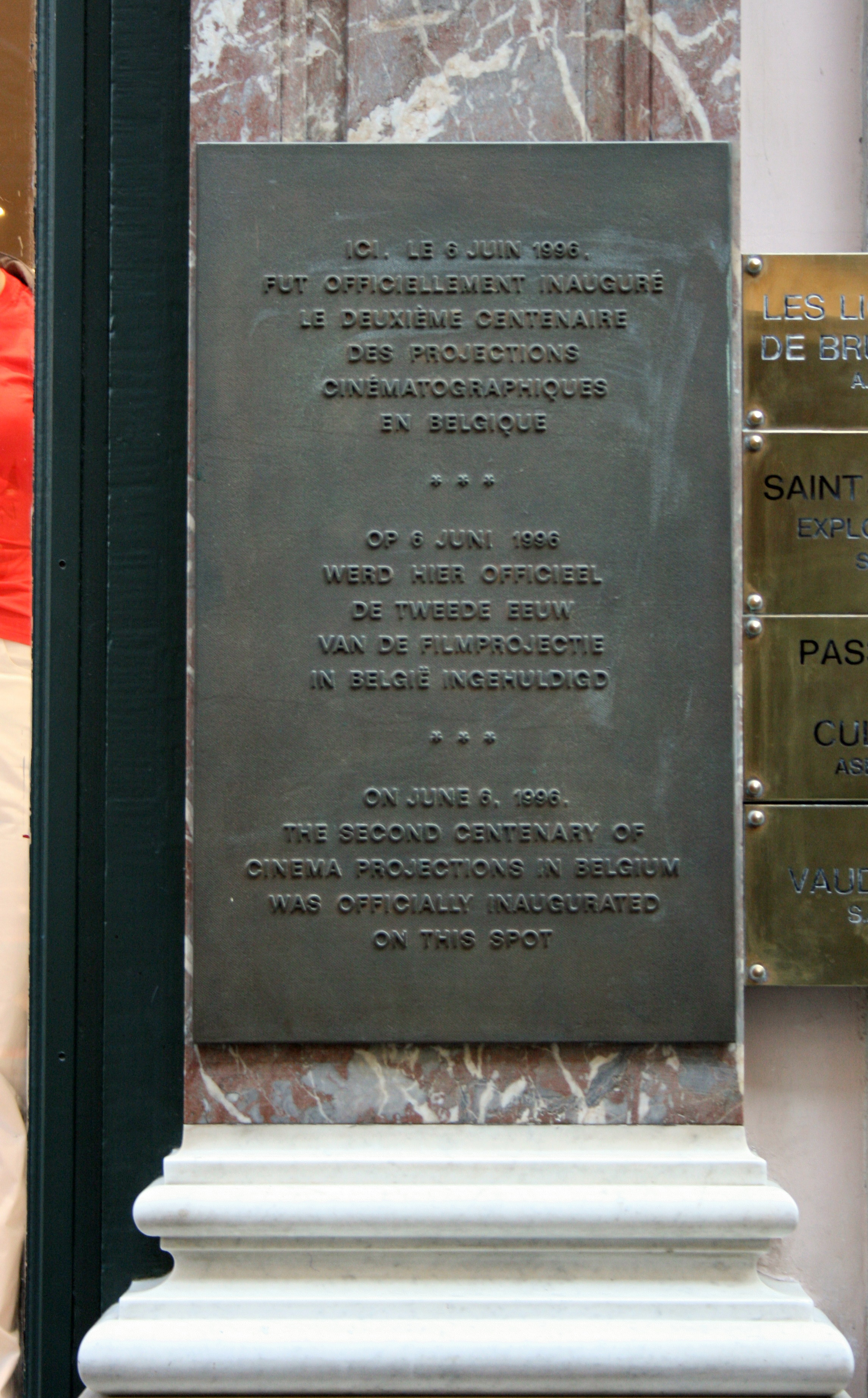 Galerie du roi 7 (Galeries Saint-Hubert) à Bruxelles (Belgique). Le texte peu clair de cette plaque commémorative rappelle la première projection du cinématographe Lumière en Belgique qui eut lieu ici le 1er mars 1896